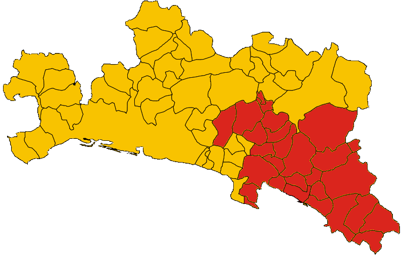 Mappa dei confini della diocesi di Chiavari